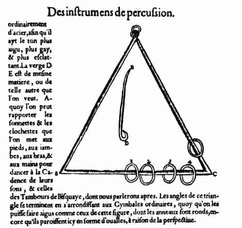 Triangle (instrument) in Mersenne's book L'Harmonie universelle Paris, 1636